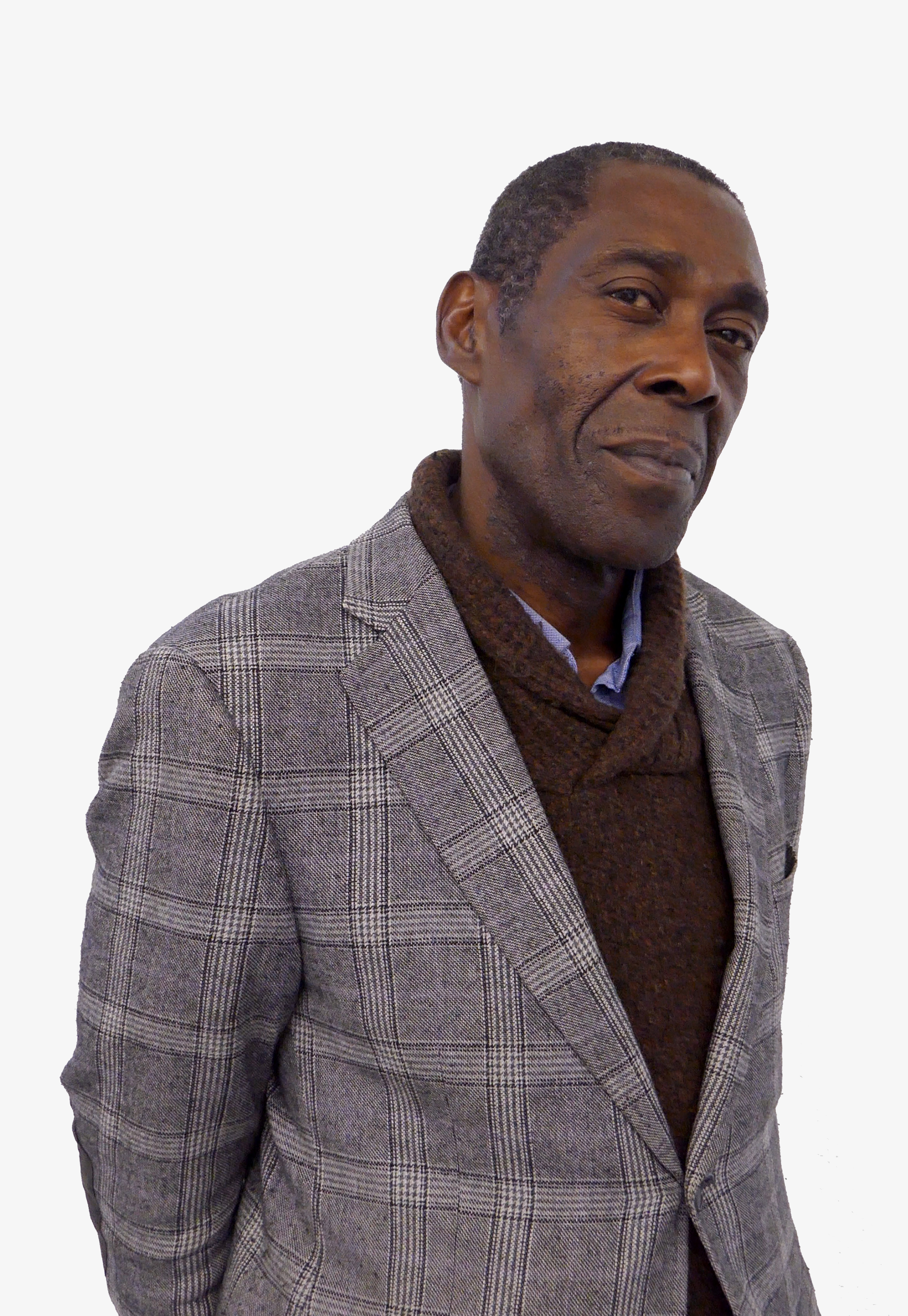 In Koli Jean Bofane au Festival international de géographie 2016 à Saint-Dié-des-Vosges (France).